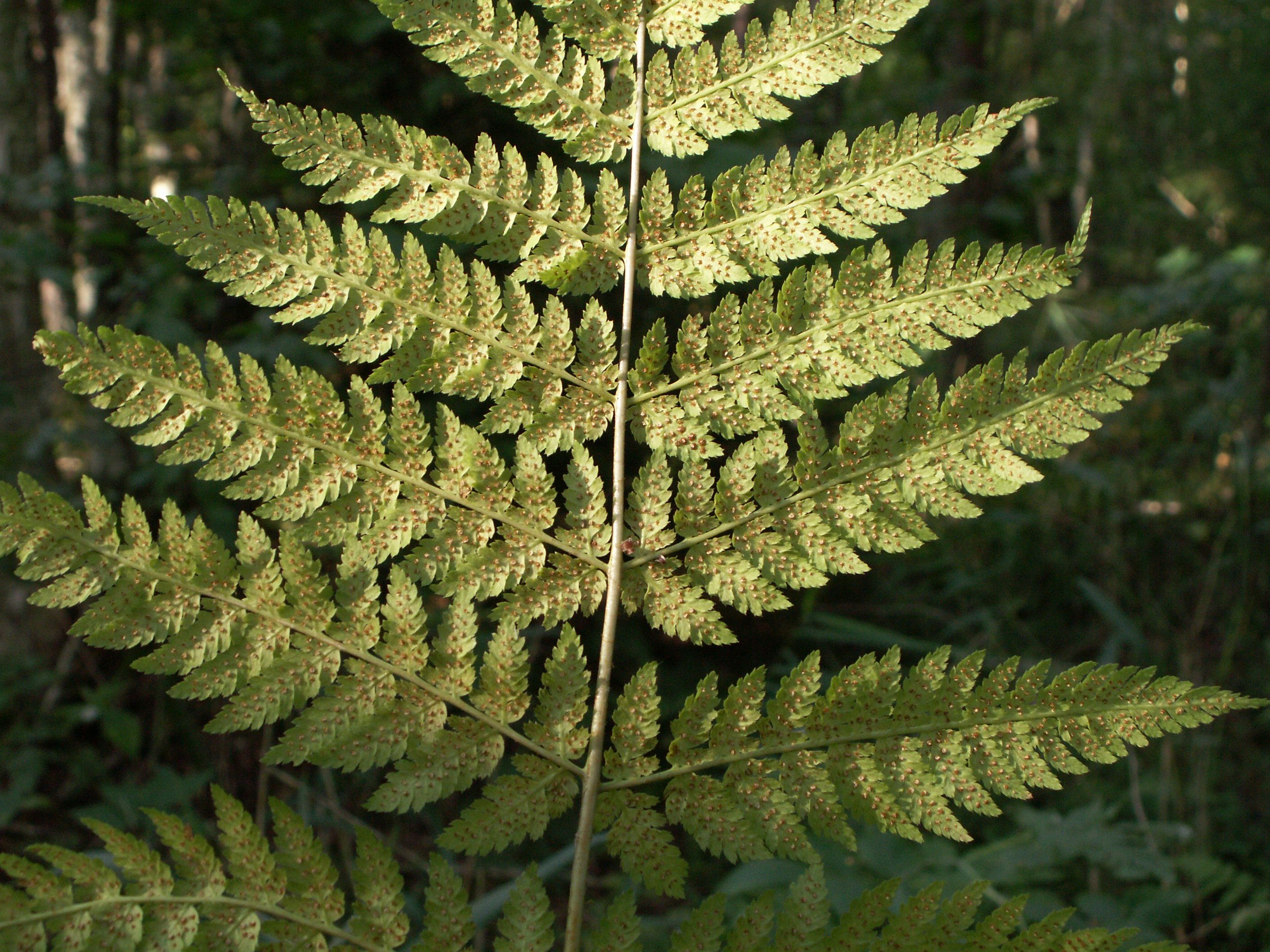 Dryopteris dilatata, Litauen, Schwarzerlen-Fichten-Wald